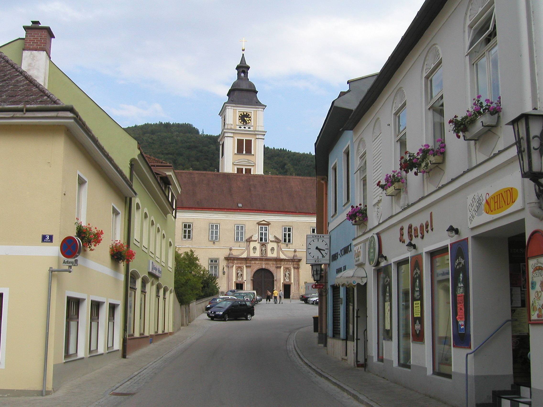 Lilienfeld